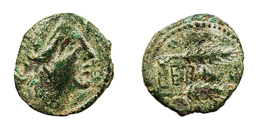 Semis de bronce acuñado en Cerit, la actual Jerez de la Frontera (provincia de Cádiz, España). Muestra la leyenda "CERI".